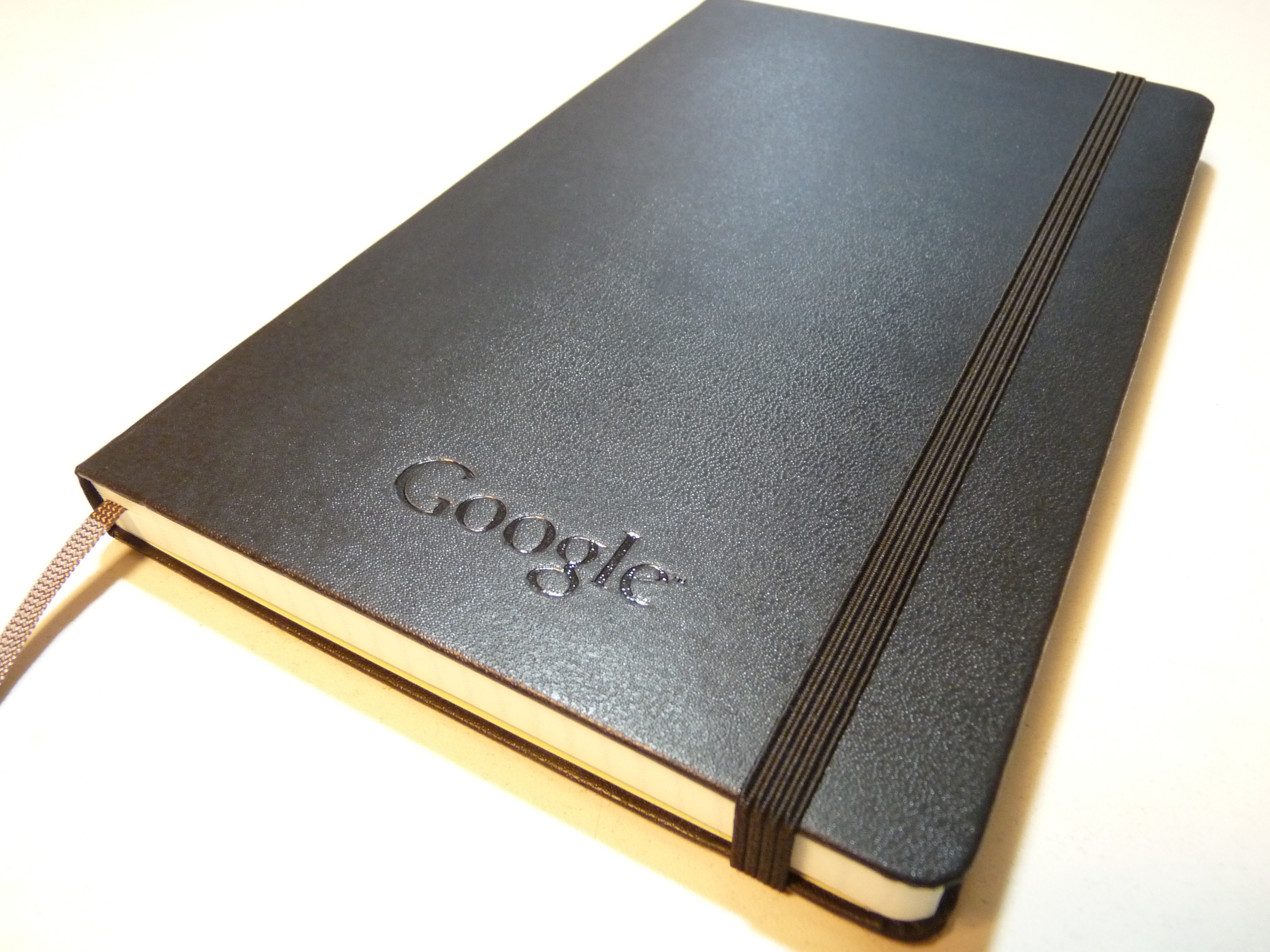 Moleskine by Google